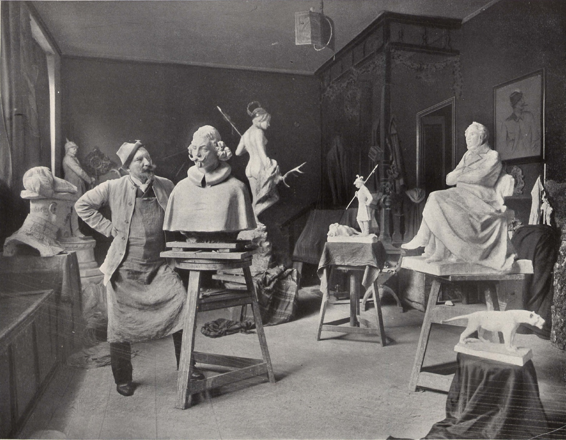 Norbert Pfretzschner (1850-1927), österreichischer Bildhauer und Jagd-Schriftsteller aus einer Tiroler Künstlerfamilie, Professor in Berlin.